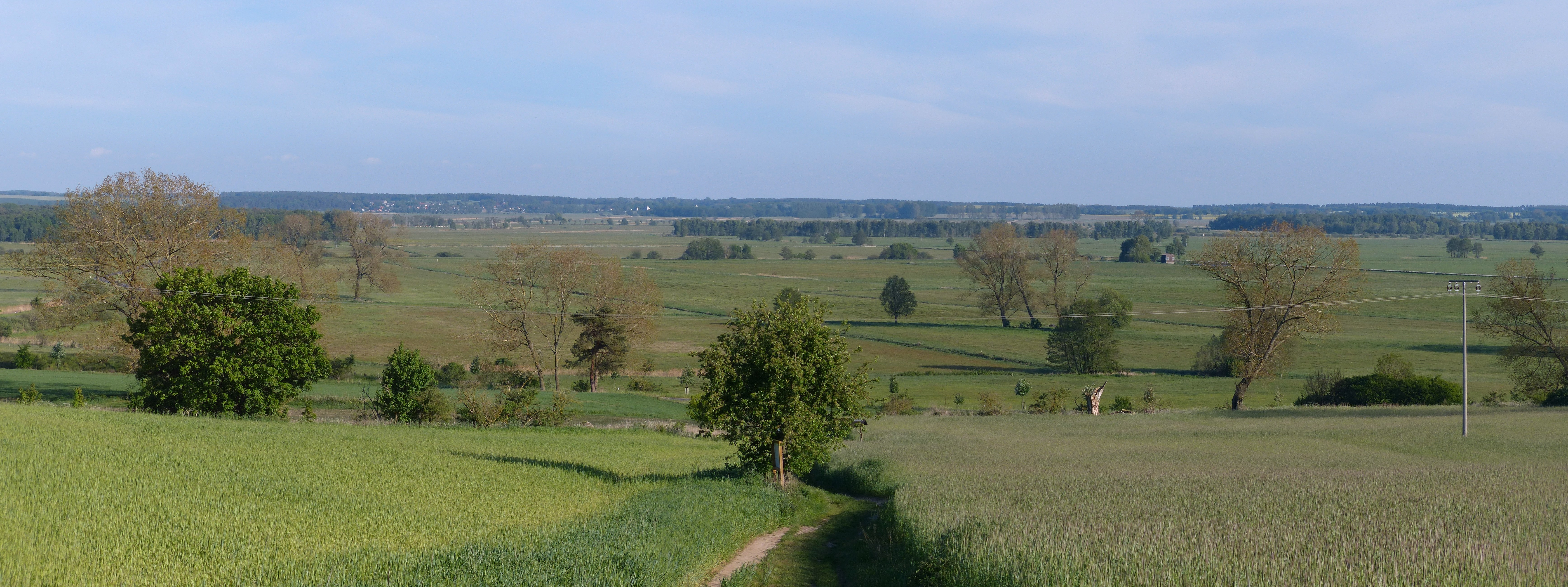 Blick vom Kückelsberg über das Thurbruch. Im Hintergrund liegt der Ort Zirchow.